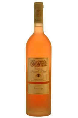 bouteille de saint-drézéry, puech-haut rosé